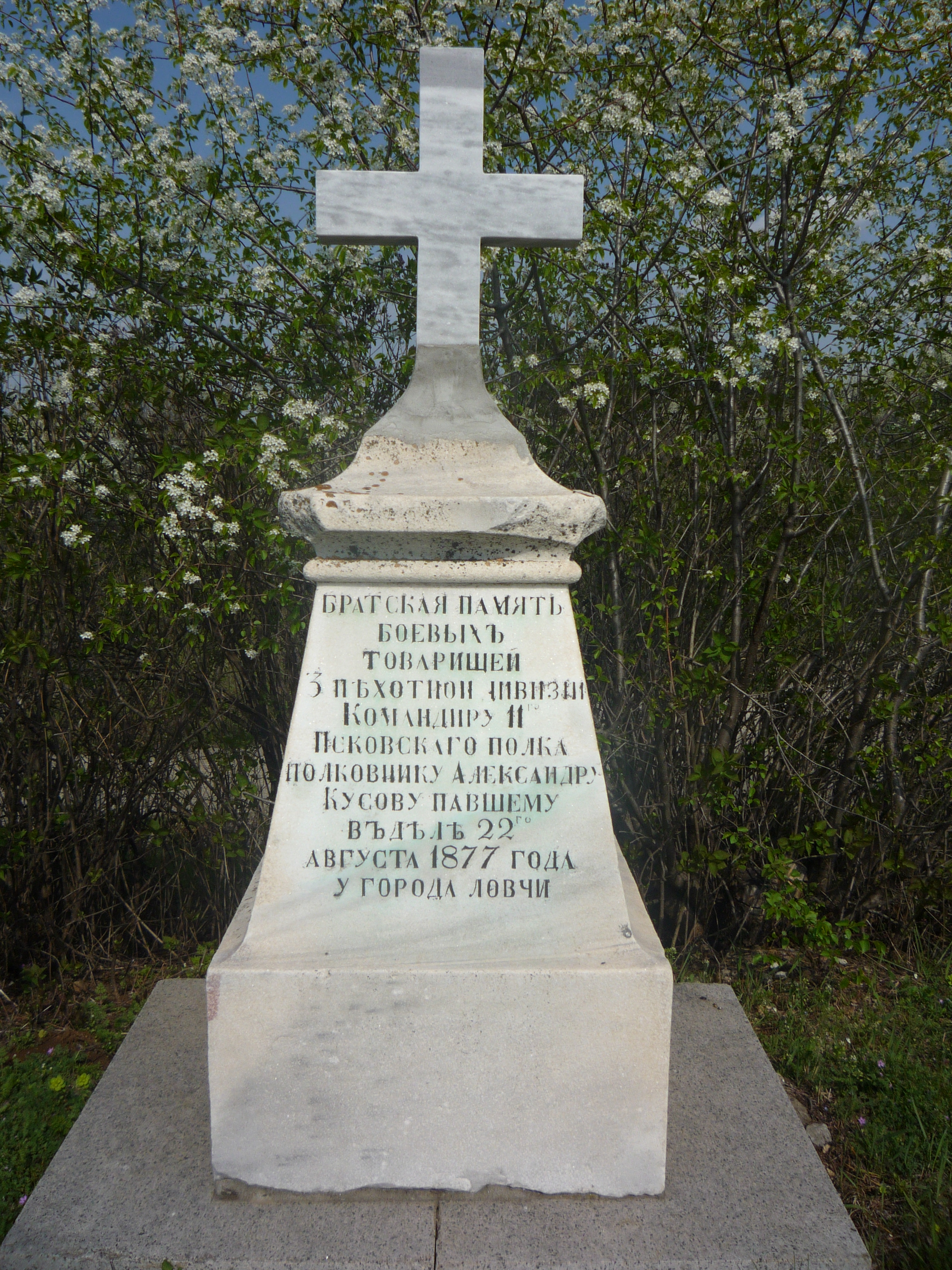 Паметник на братската памет на бойните другари от 3-та пехотна дивизия за командир на 11-и пехотен Псковски полк, полковник Александър Иванович Кусов. Алея на Българо-руската дружба, хълма "Стратеш", град Ловеч.